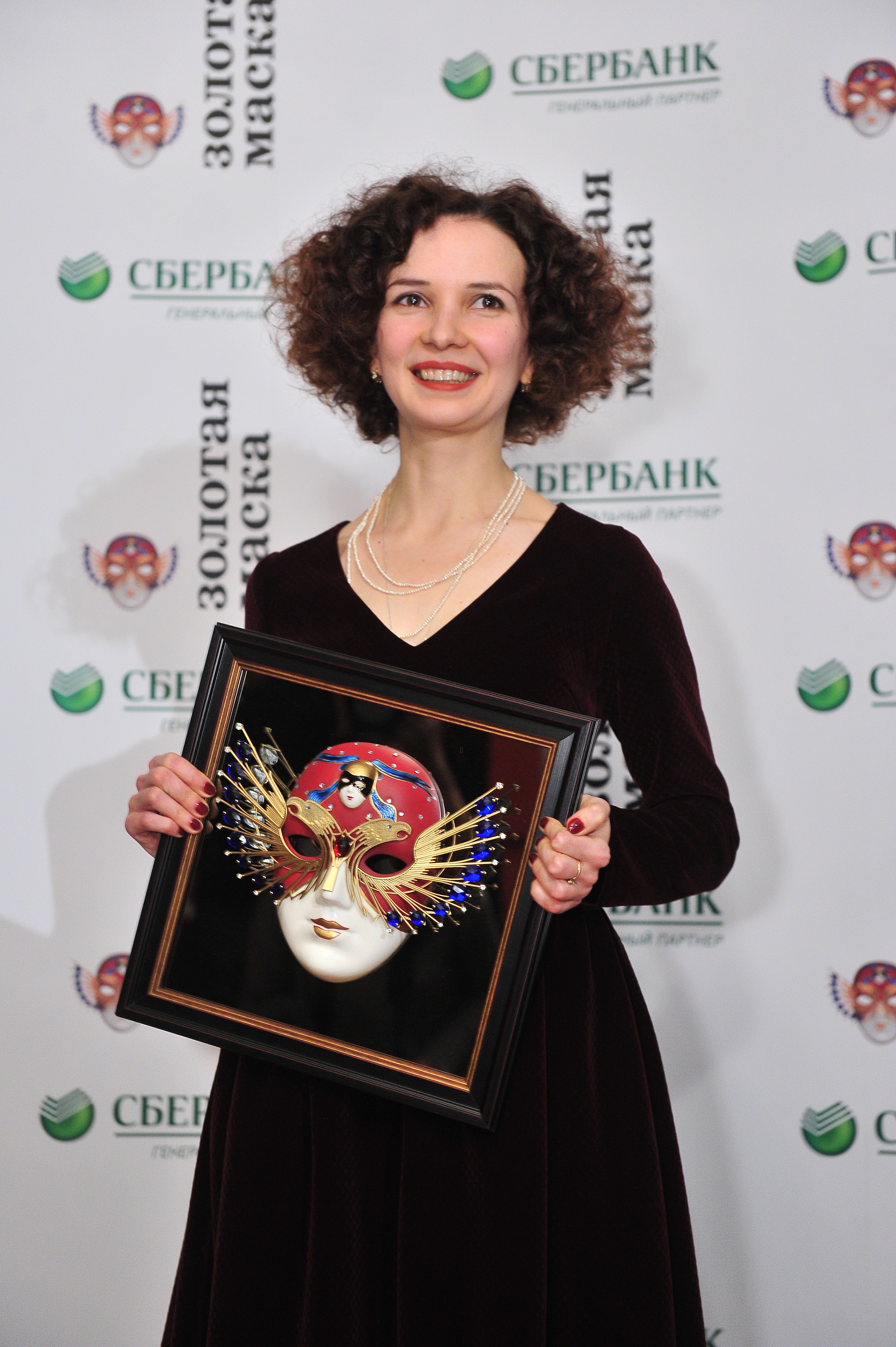 Golden Mask Award 2016. Maria Smolnikova, Мария Смольникова